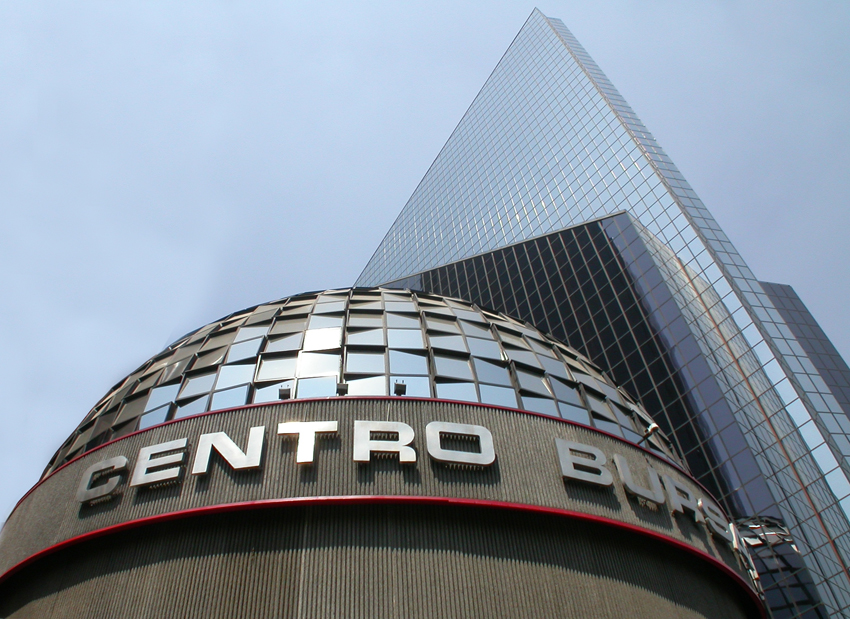 Perfil BMV